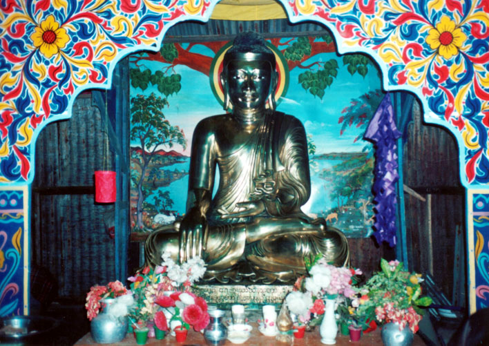 কুয়াকাটা সমুদ্র সৈকতের পাশের মন্দিরে বুদ্ধ মূর্তিটির অবস্থান